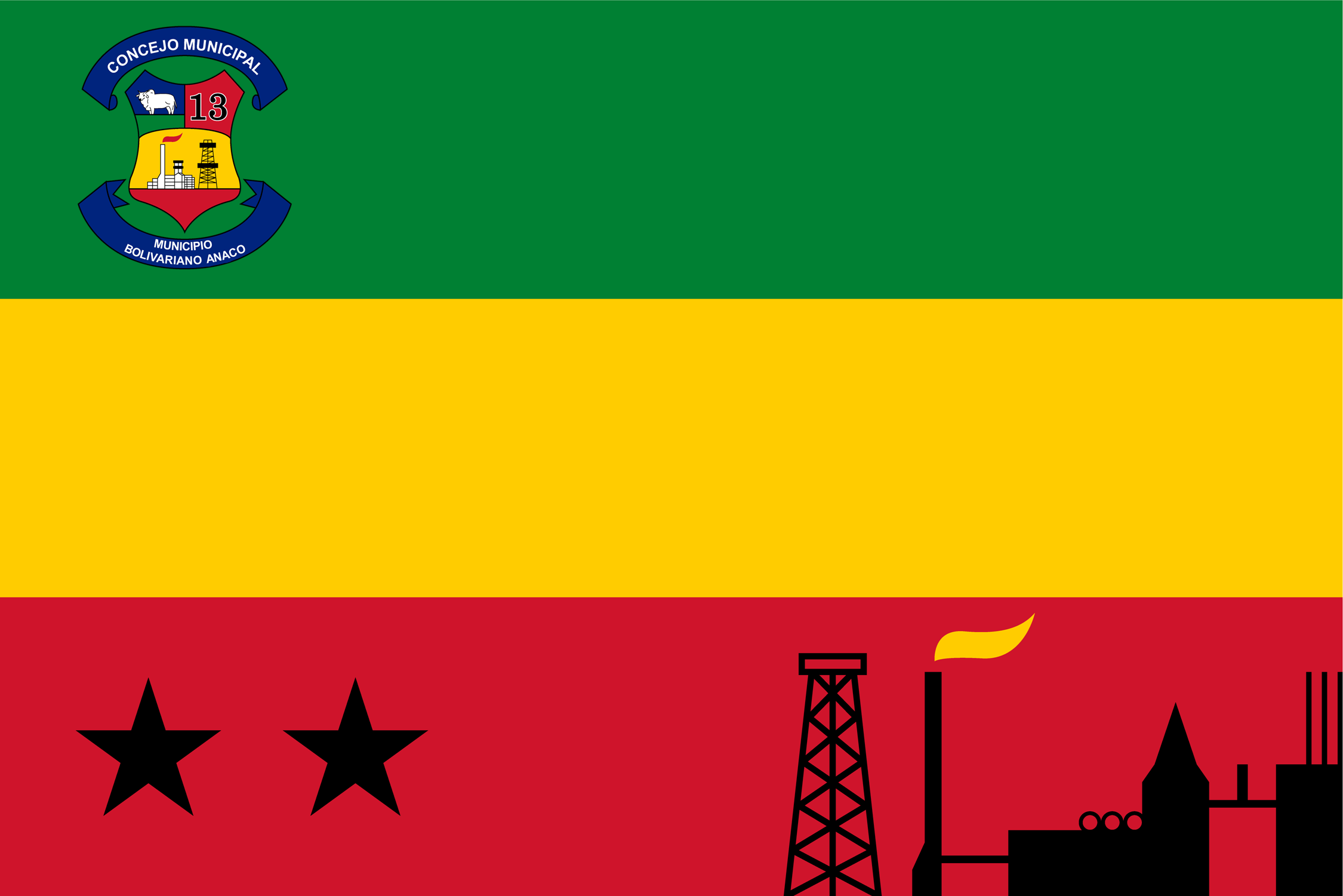 Bandera de Anaco